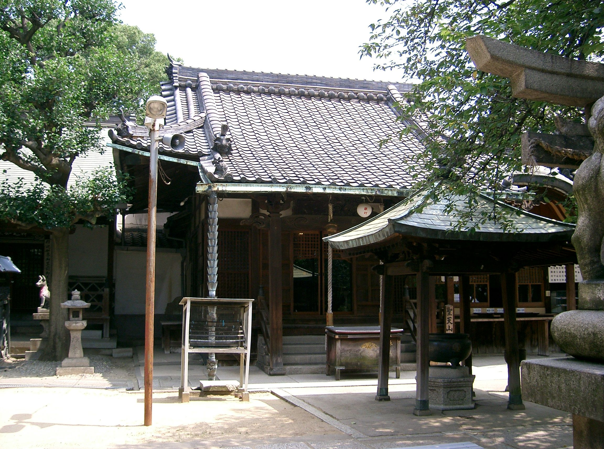 正圓寺